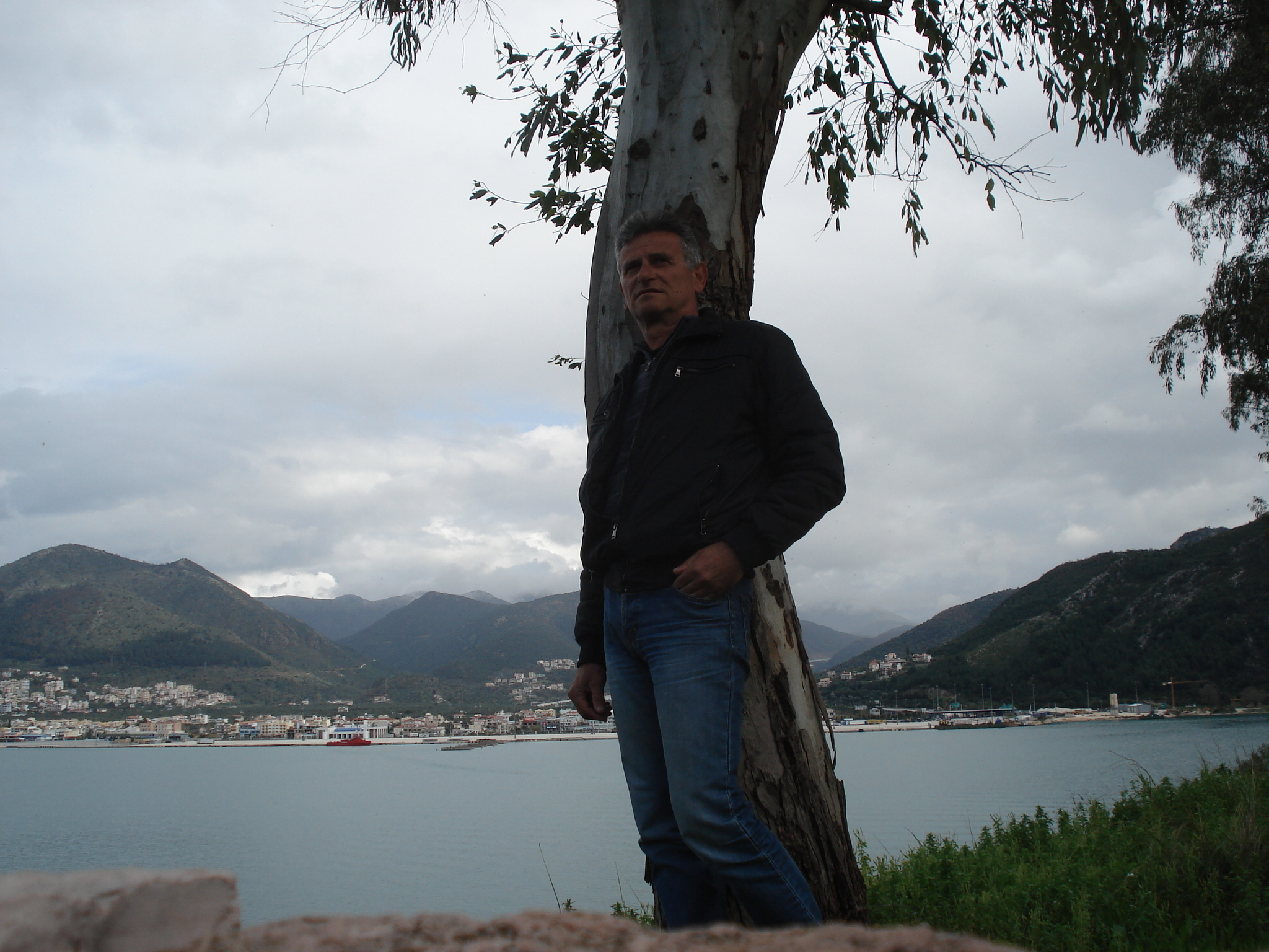 Φωτογραφία